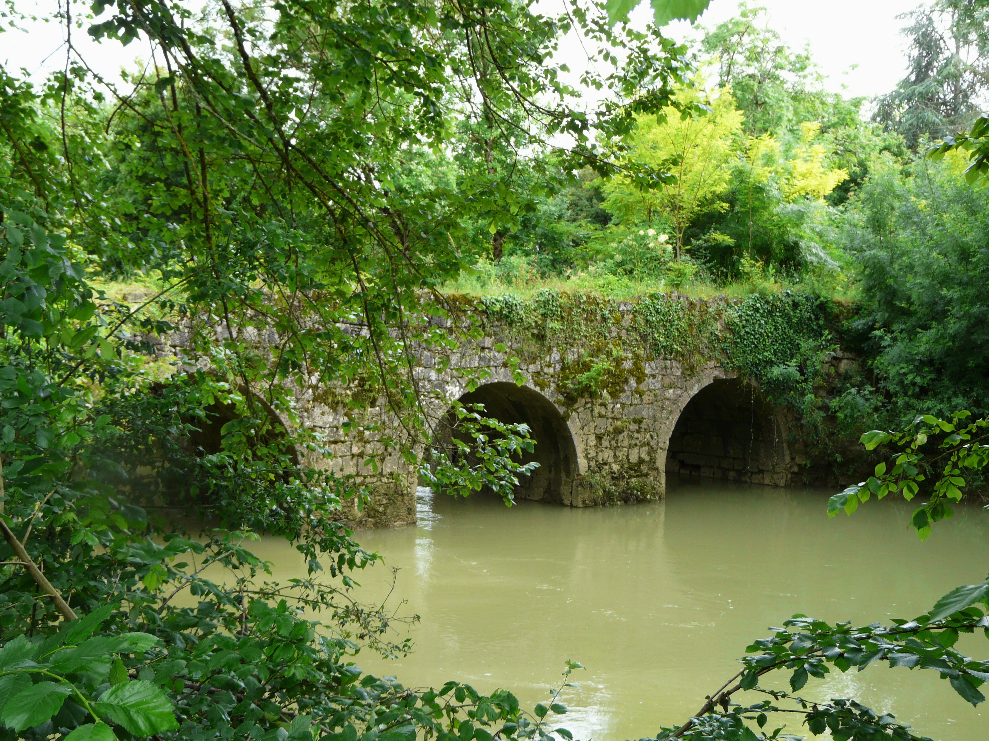 Le pont de Tauziète sur l'Osse entre Nérac (au premier plan) et Andiran ; Lot-et-Garonne, France.